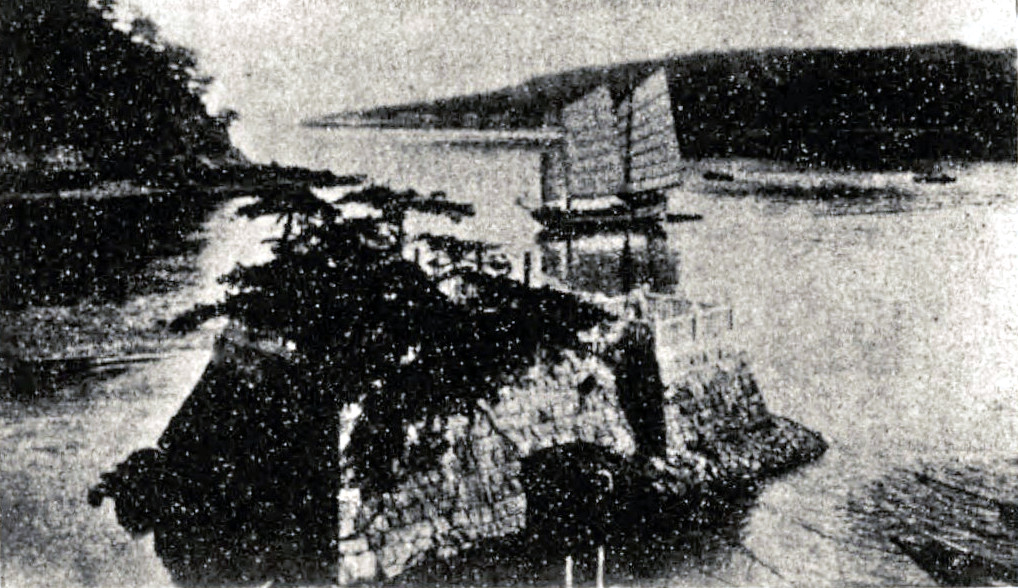 広島県呉市の音戸の瀬戸にある清盛塚。1935年時点。